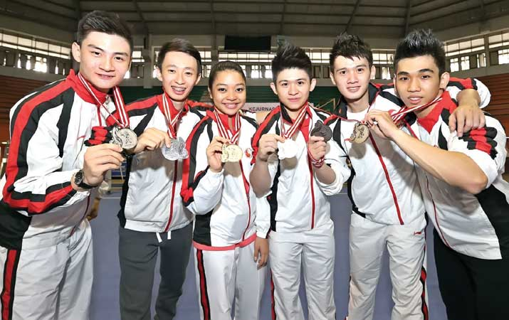 Eric; Posisi ketiga dari kanan